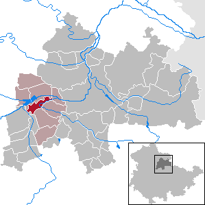 Henschleben in Thuringia - District Sömmerda